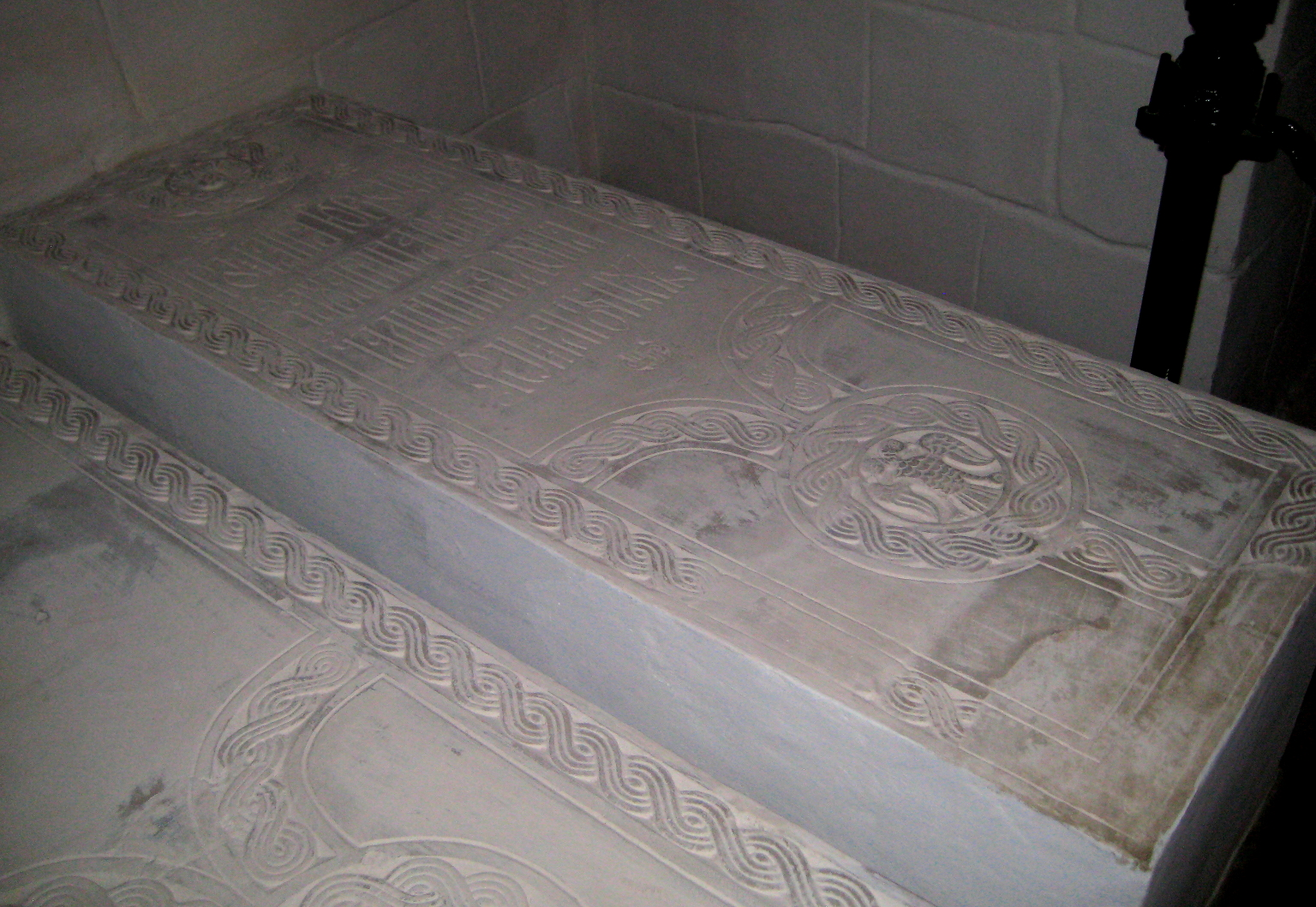 Новоспасский монастырь. Усыпальница Романовых / Роман Юрьевич Захарьин, родоначальник дома Романовых